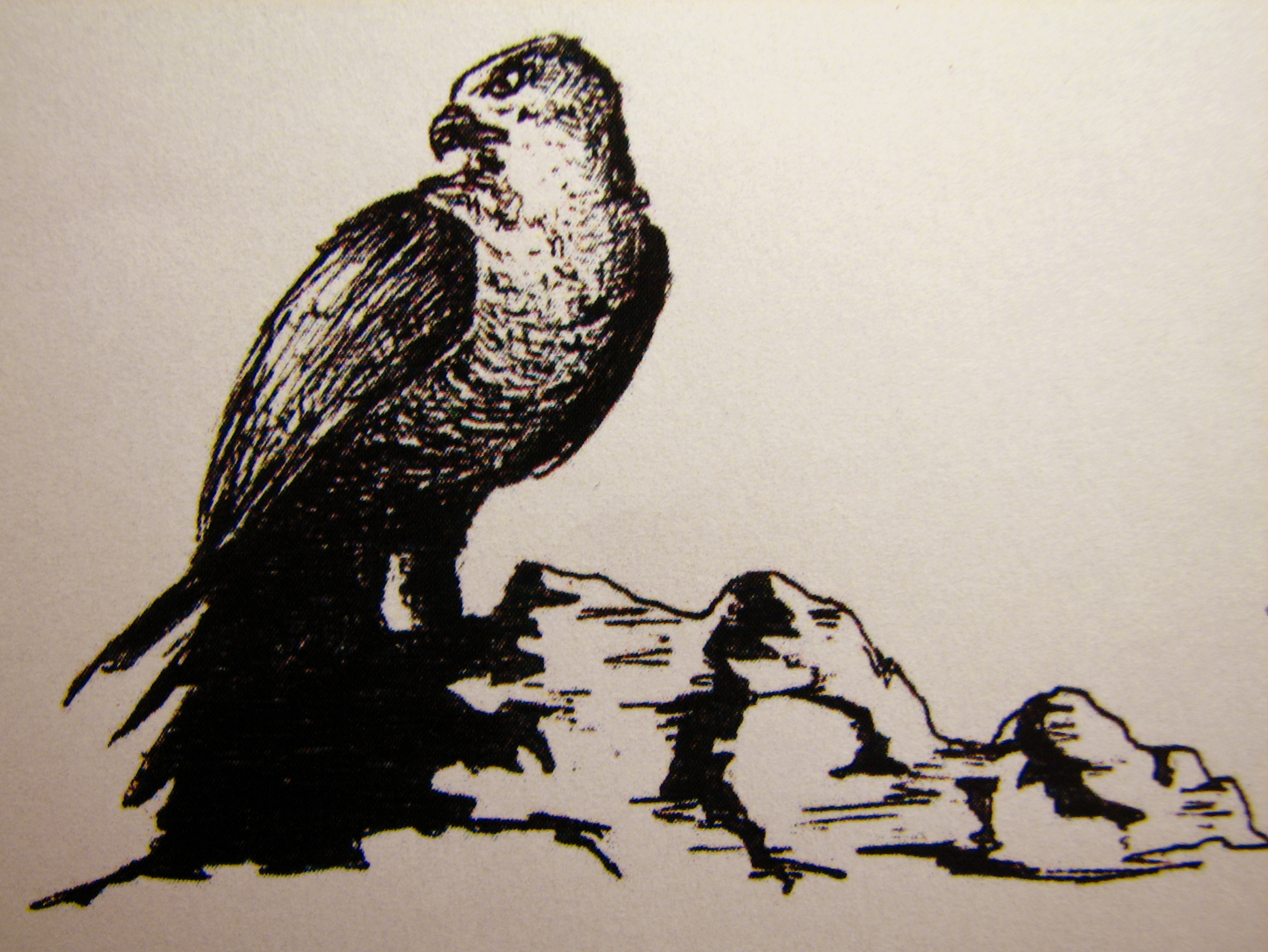 Simbol skupine, nastal pod svinčnikom ustanovitelja GSRK